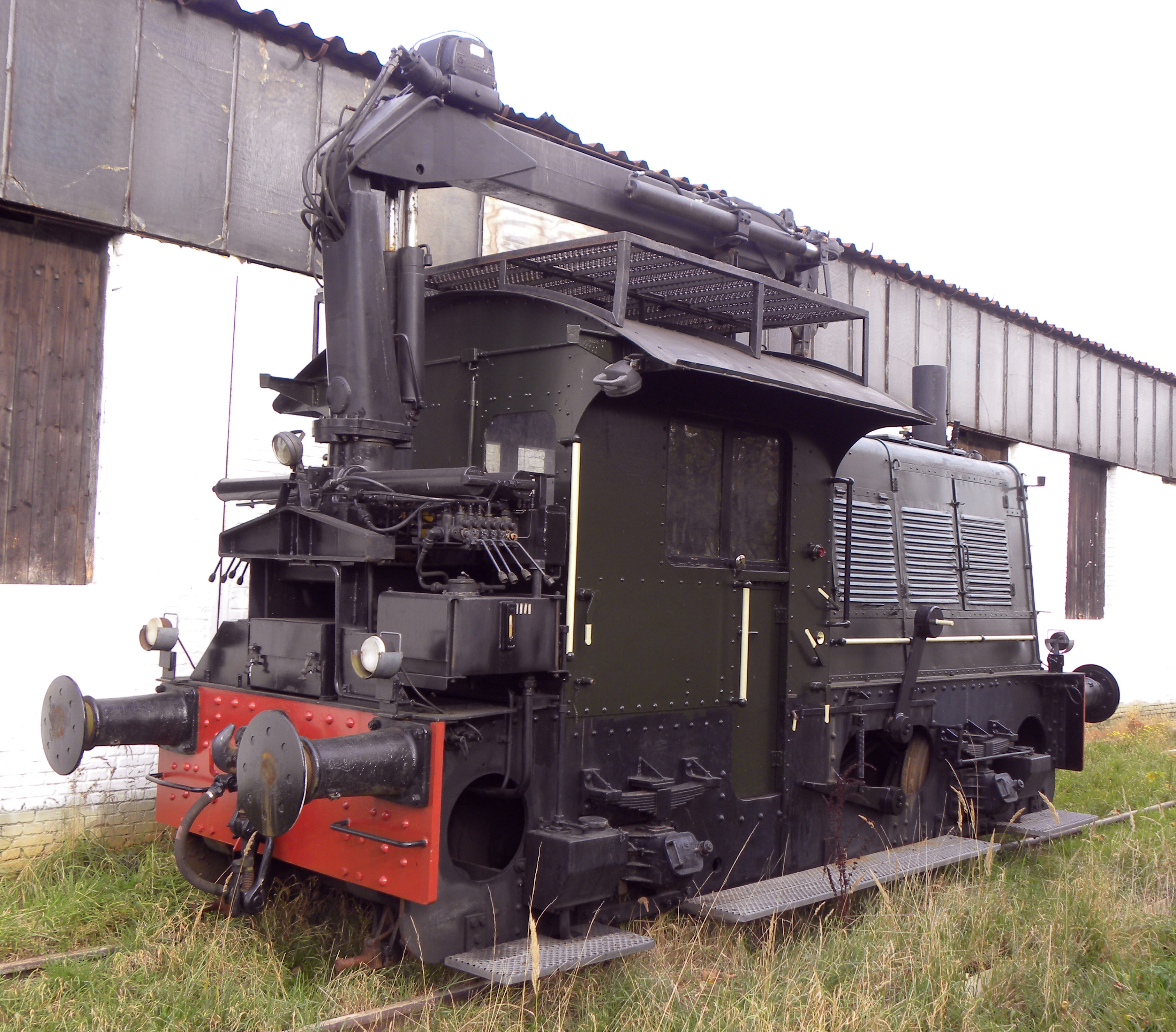 Locomotor Sik